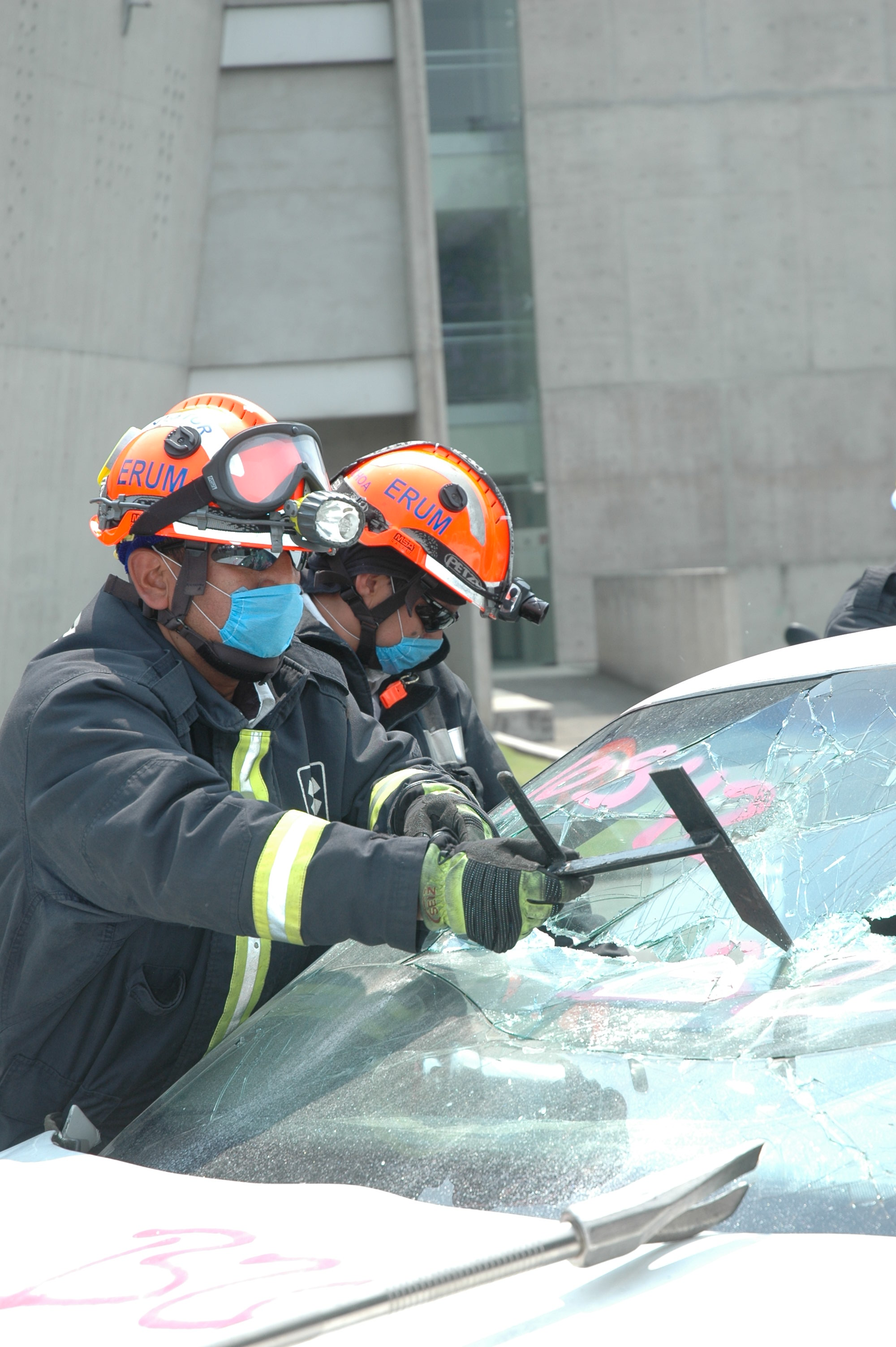 1 quitar parabrisas durante una demonstración del Escuadrón de Rescate y Urgencias Médicas de la Ciudad de México en ITESM Campus Ciudad de México